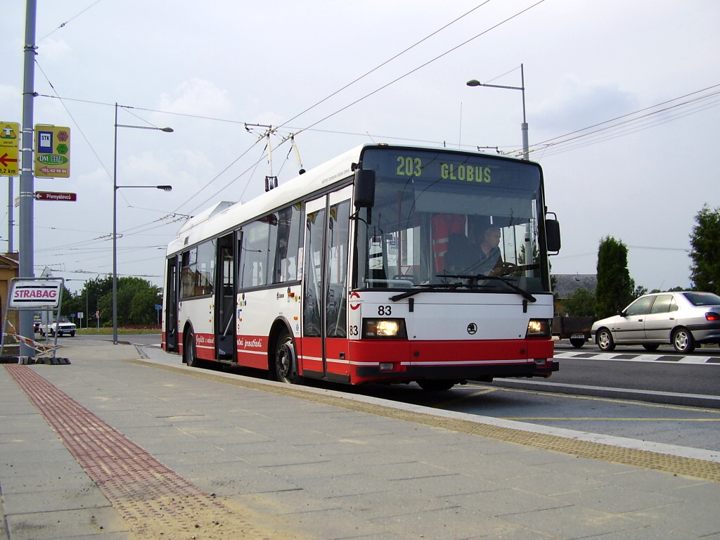 Jediný trolejbus typu 21 Tr v Opavě. Konečná "Jaktař".